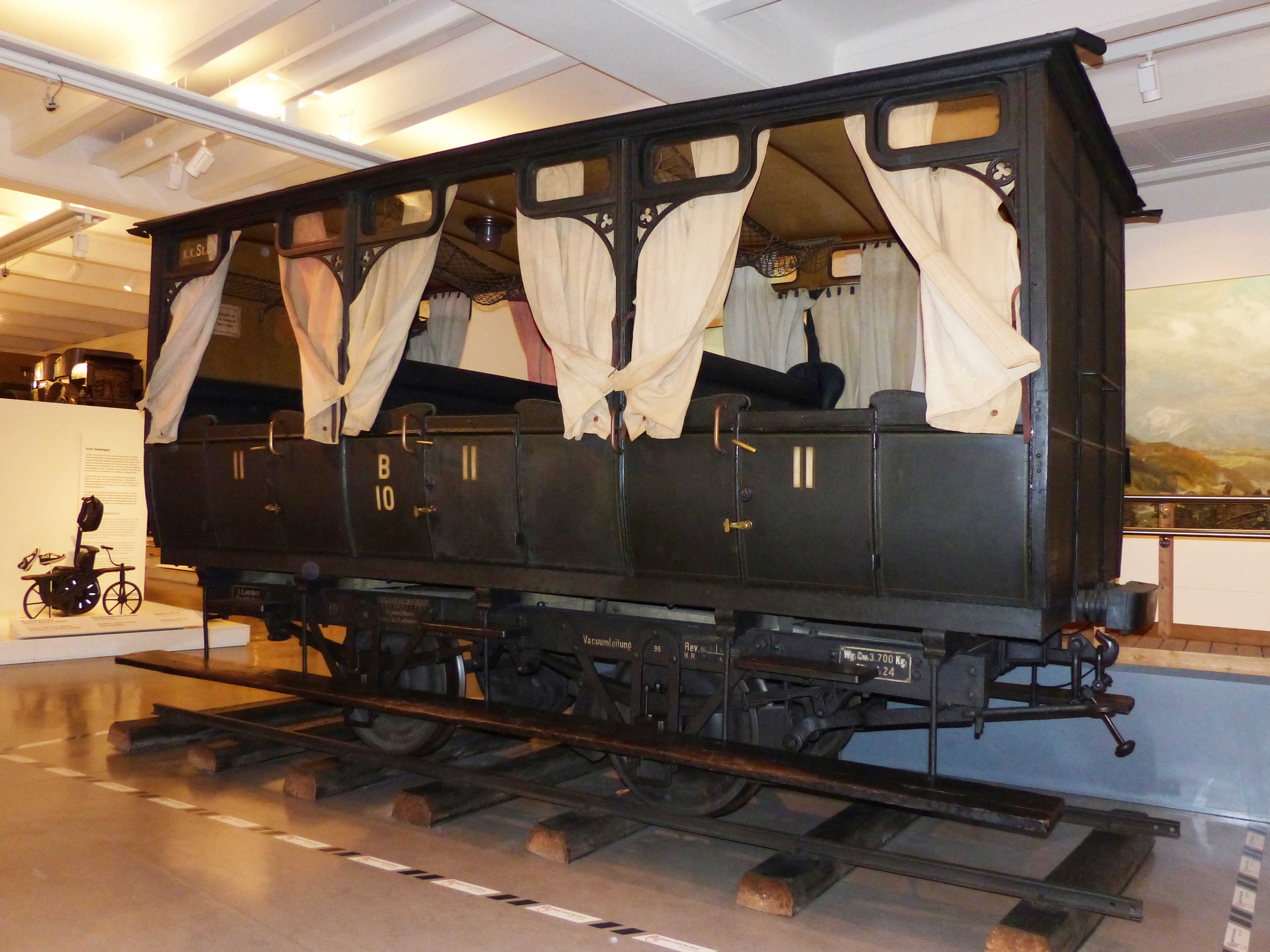 Personenwagen 2. Klasse für den Sommerbetrieb, 1855, Maschinen- und Waggonbaufabrik Johann Spiering Wien; Exponat im Technischen Museum Wien